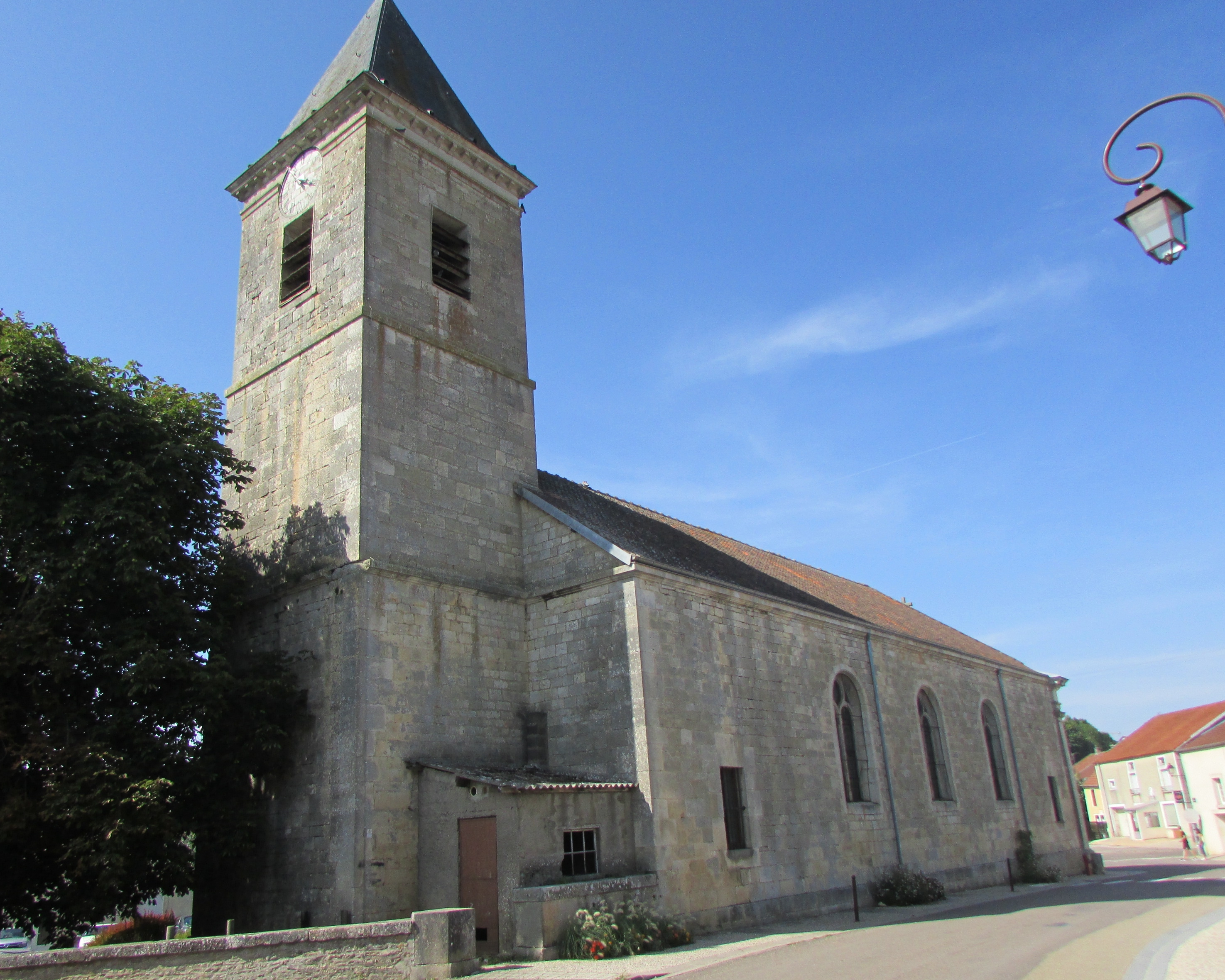 L'église.